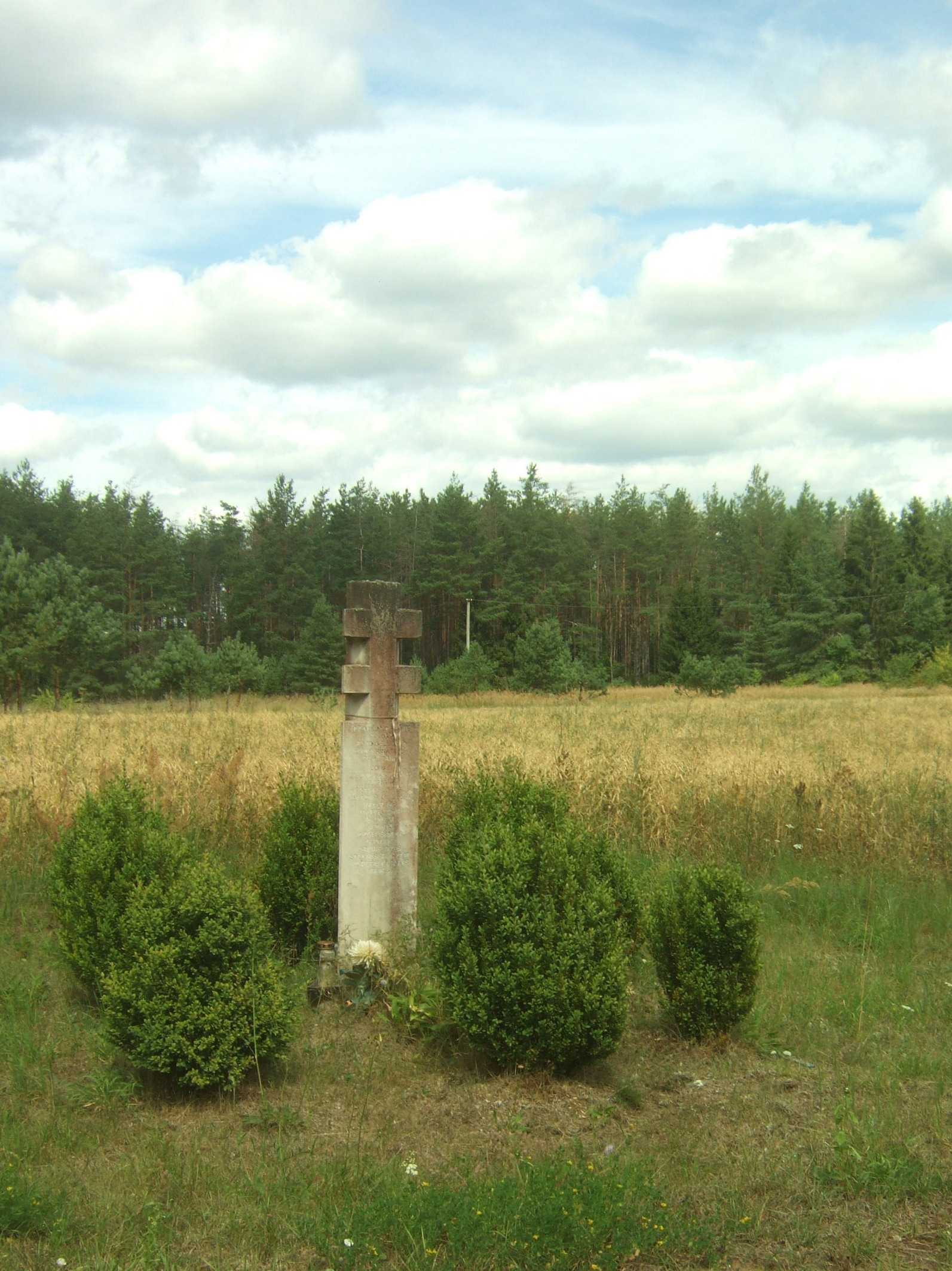 Kryžius 1945 m. žuvusiems partizanams Pagelužio kaime (Trakų r.), pastatytas 2005 m.